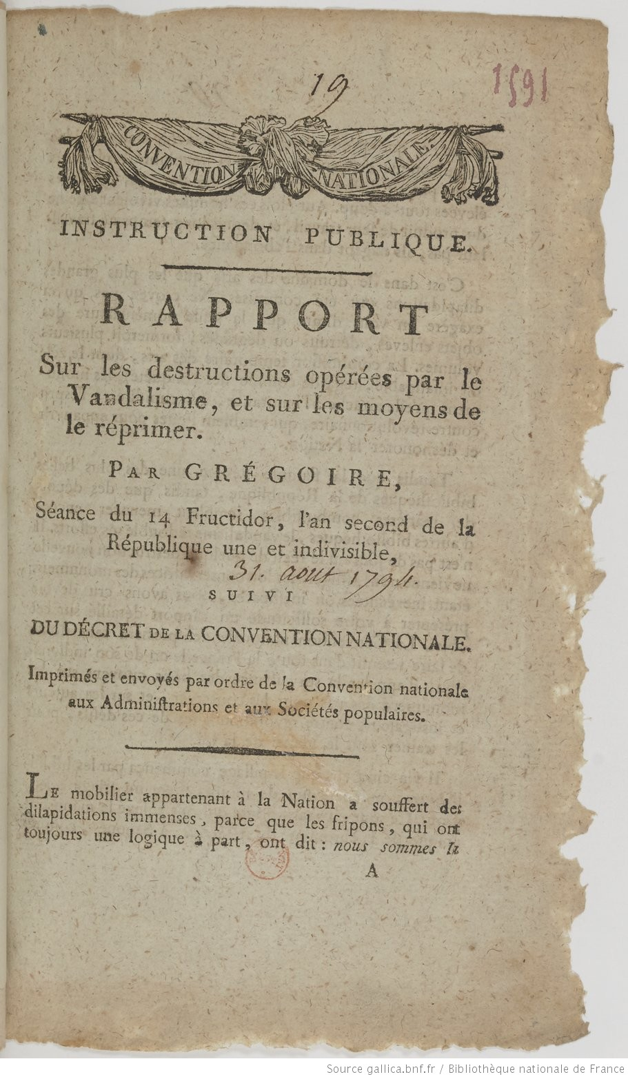 Rapport sur les destructions opérées par le Vandalisme, et sur les moyens de le réprimer Par Grégoire, Séance du 14 Fructidor, l'an second de la République une et indivisible, 37 aout 1794 Bibliothèque Nationale de France, département Estampes et photographie